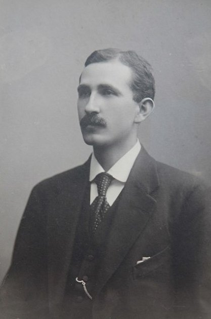 ak. malíř Adolf Träger (1888-1965)